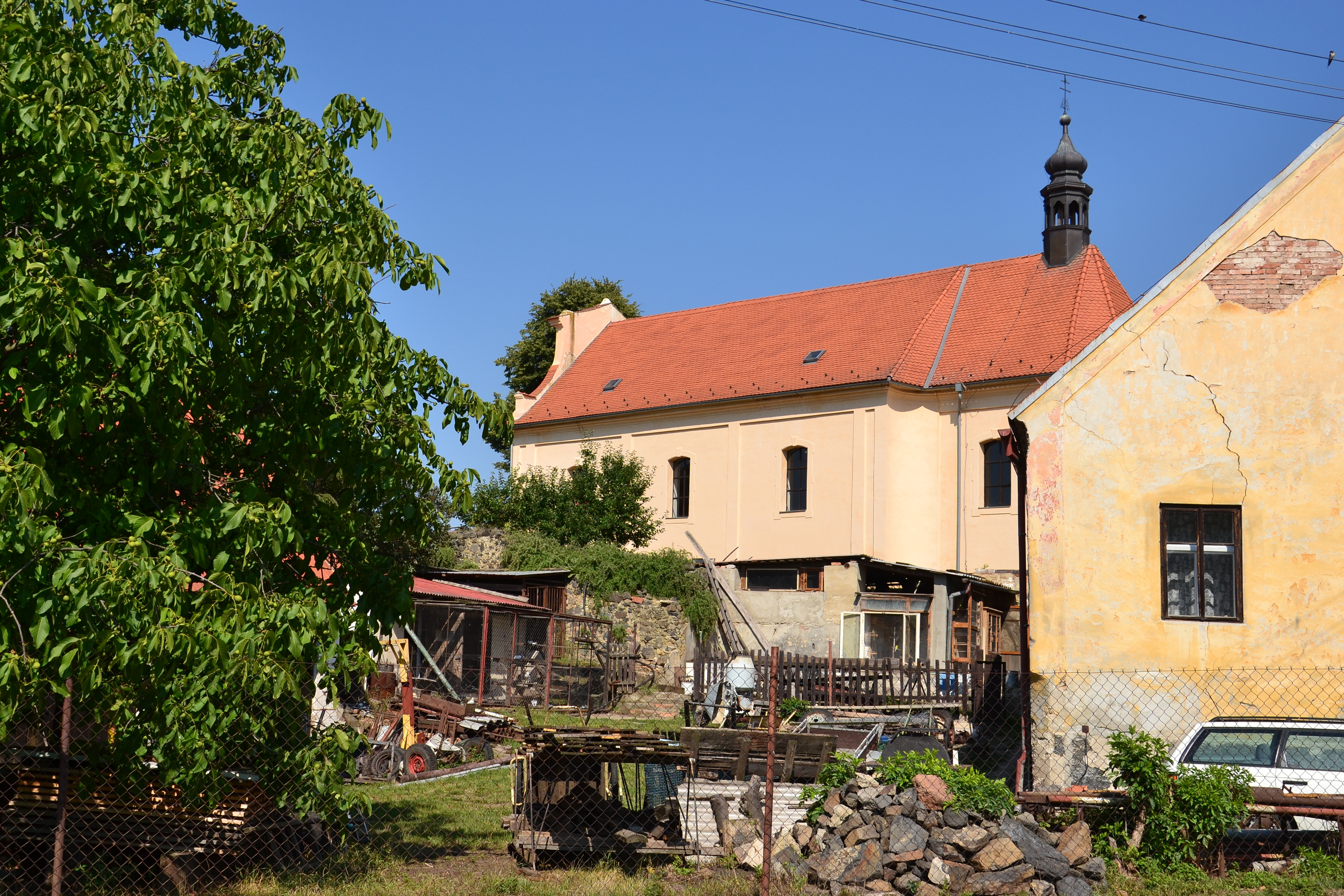 Kostel svatého Jakuba, Veliká Ves, Veliká Ves (okres Chomutov).